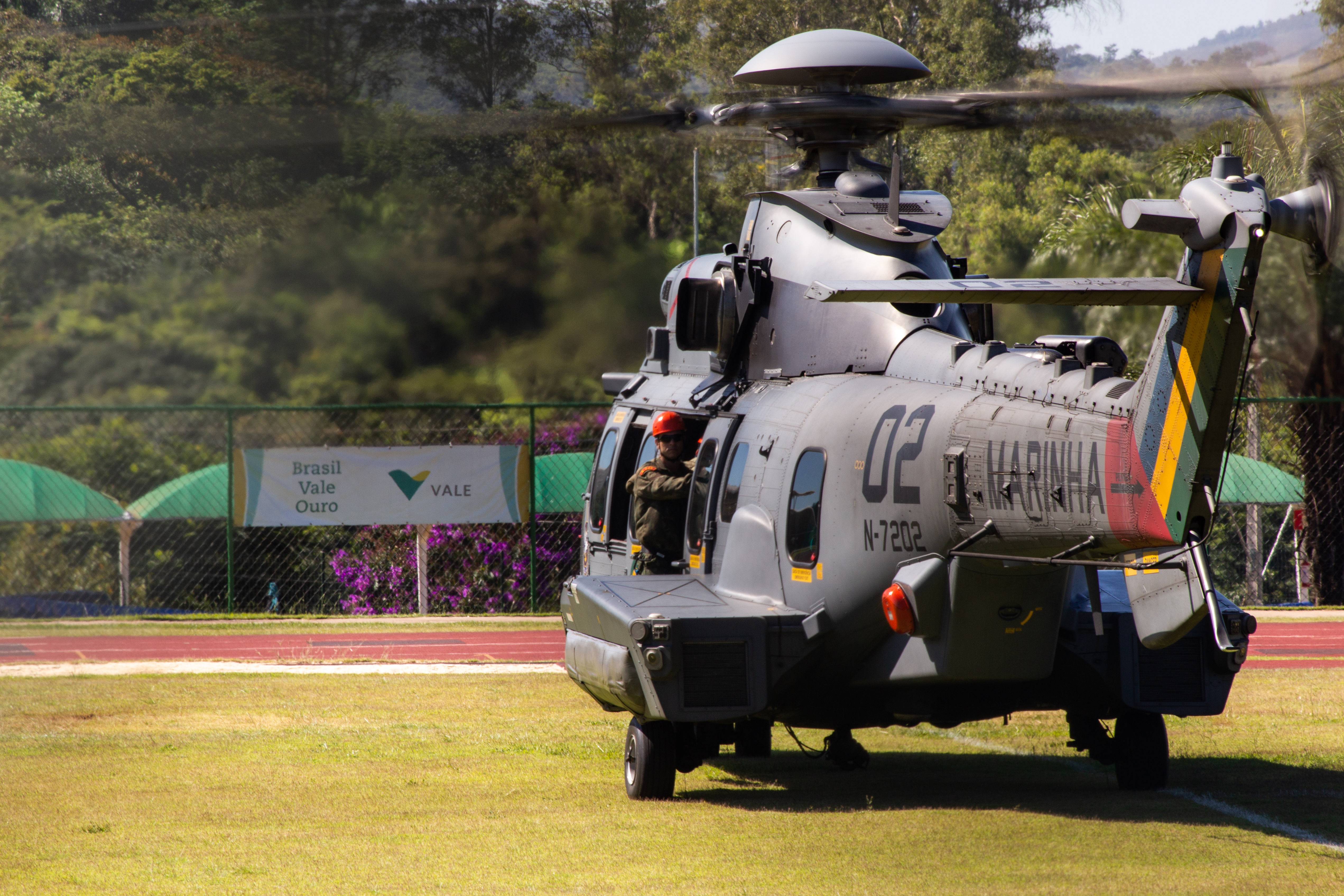 [2019-01-30] Brumadinho_016_Romerito Pontes